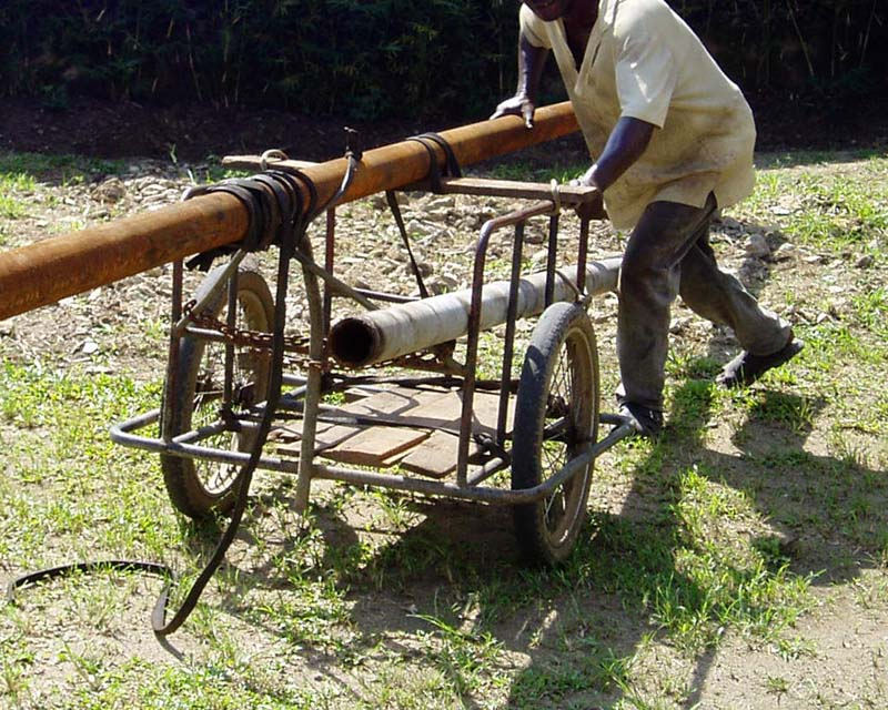 Pousse-pousse (Cabrouet) de Douala